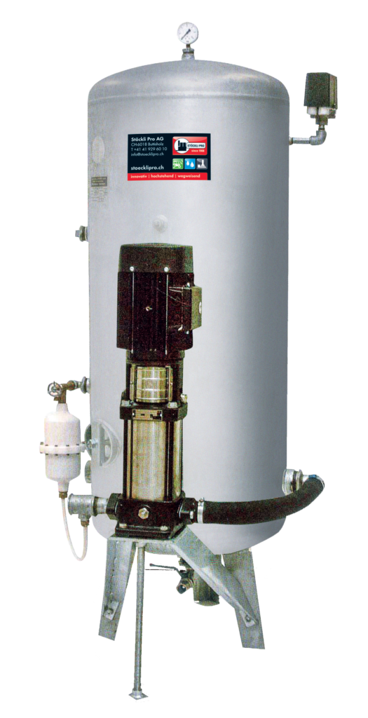 Luftregler: Hält das Luftpolster im Druckkessel aufrecht. Sicherheitsventil: Schützt vor Überdruck. Druckschalter: Schaltet die Pumpe bei eingestelltem Druck ein und aus.